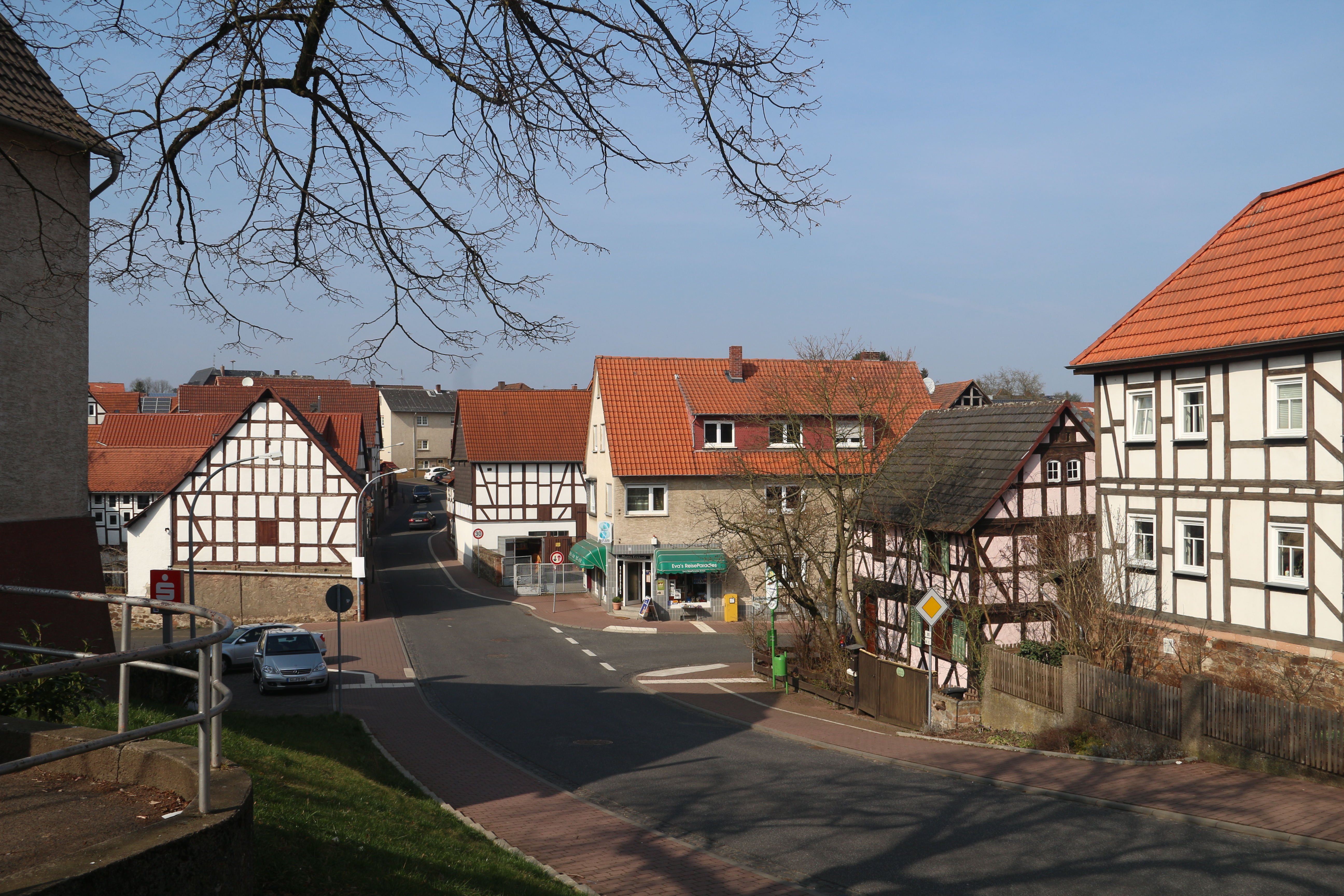 Wißmar